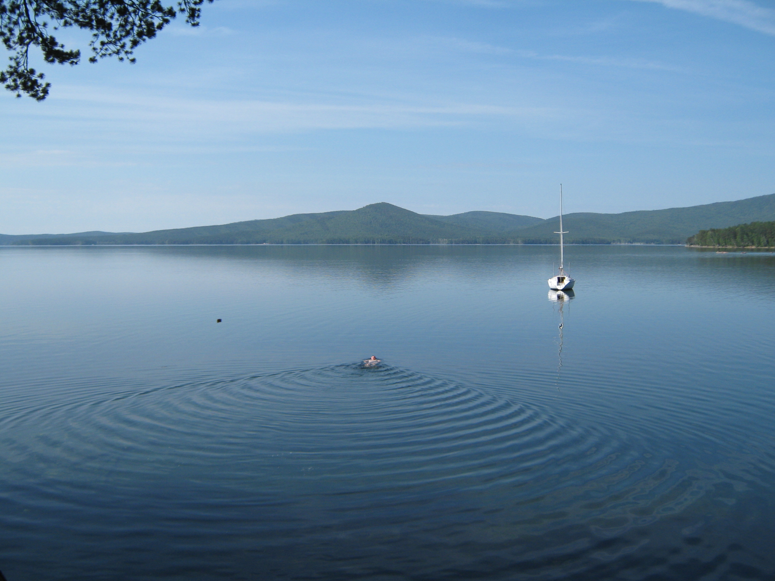 Озеро Тургояк, западная часть.